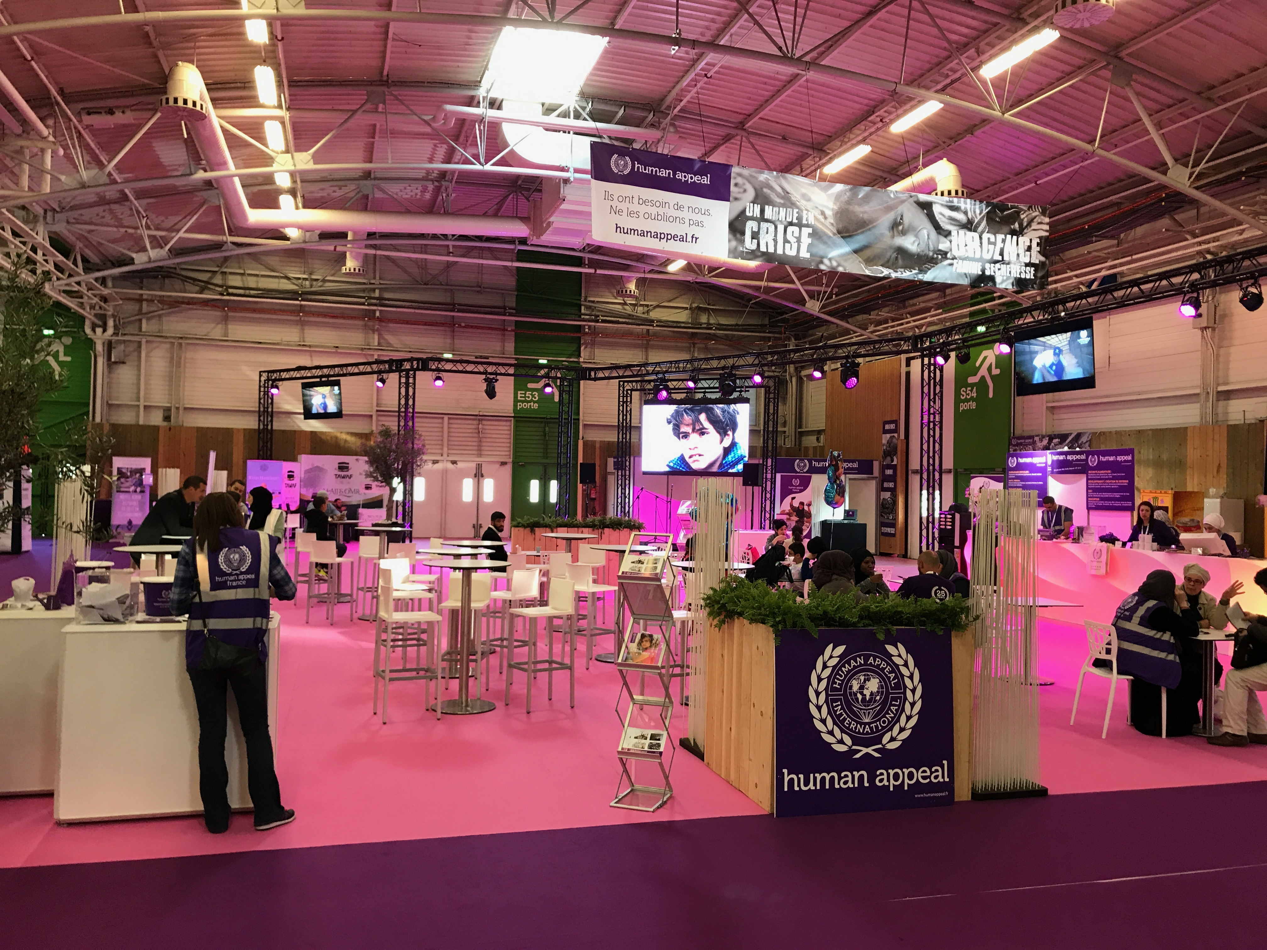 Stand Human Appeal, Rencontre annuelle des musulmans de France, avril 2017, Paris Le Bourget.